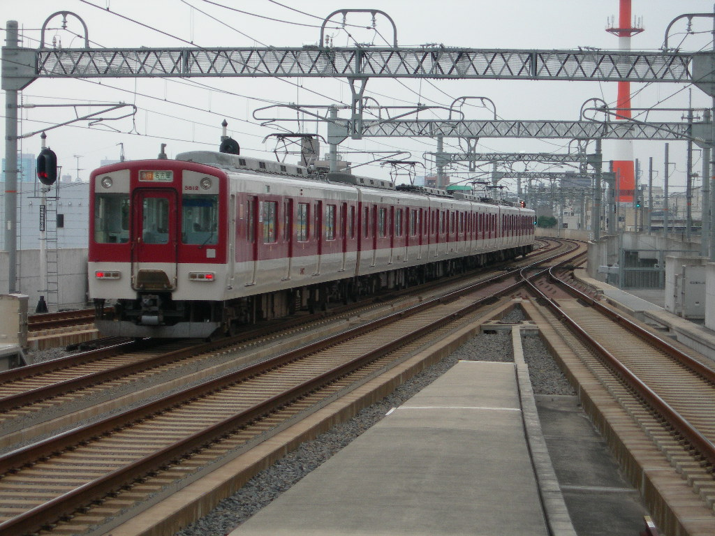 Kintetsu Series5800 at Hatta station.